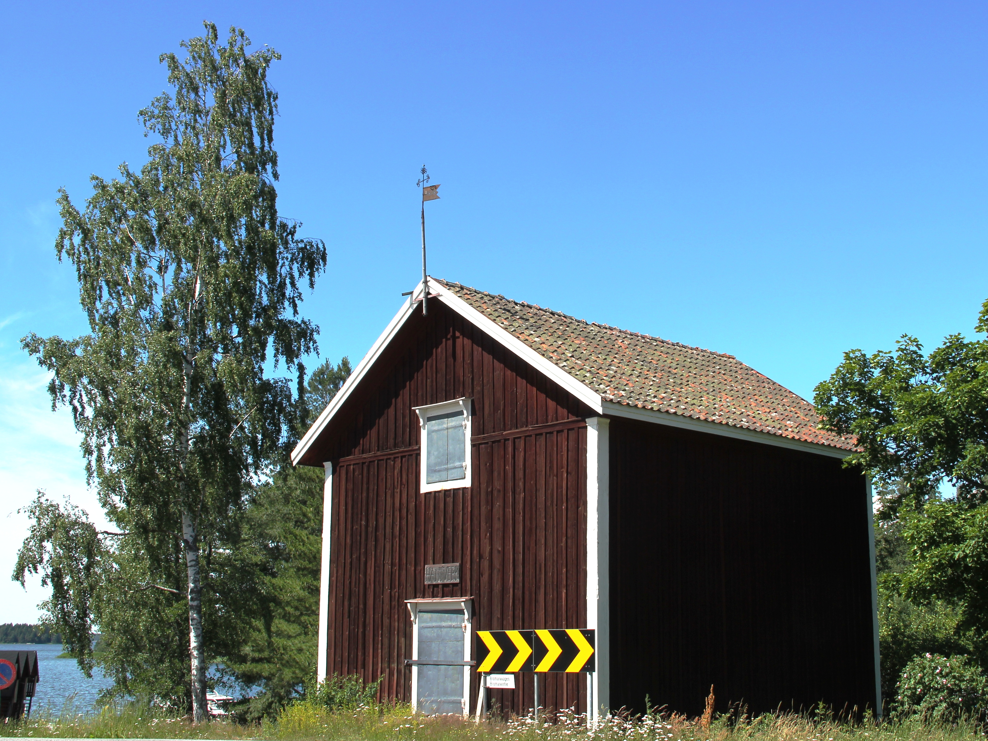 Lainamakasiini, josta katovuoden tullen sai siemenviljaa lainaksi.